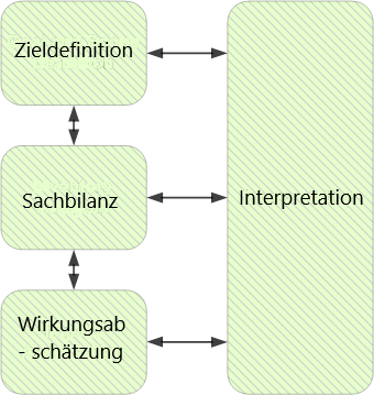 Darstellung der Phasen der Lebenszyklusanalyse